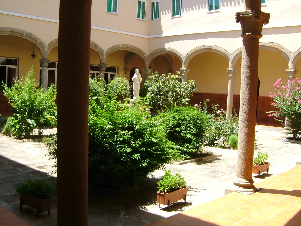 Claustro del monasterio de San Benito en Talavera de la Reina, España